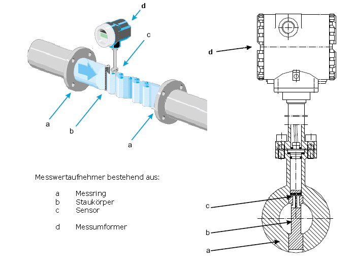 Flanschversion Vortex-Durchflussmesser